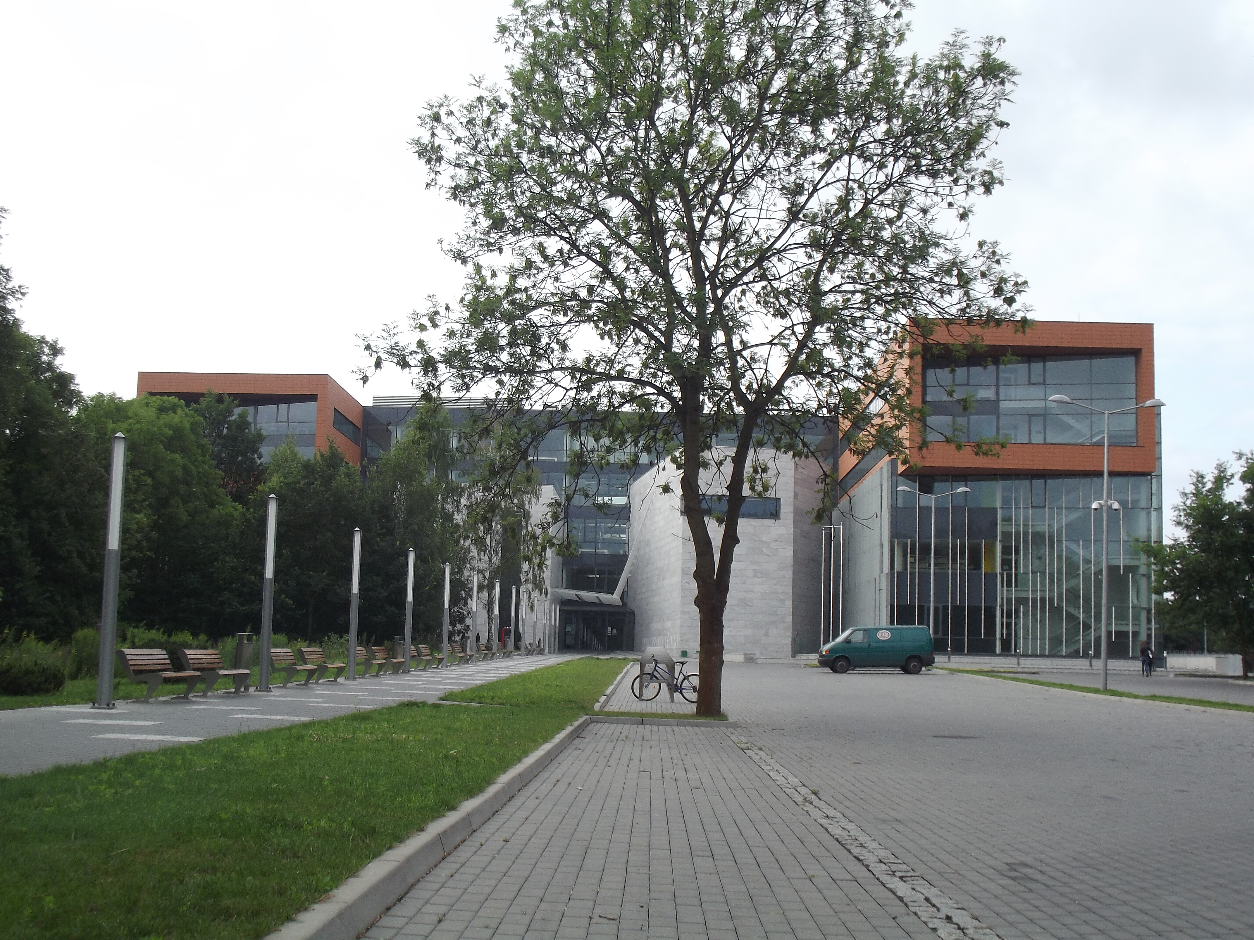 Wydział Filologiczny UŁ